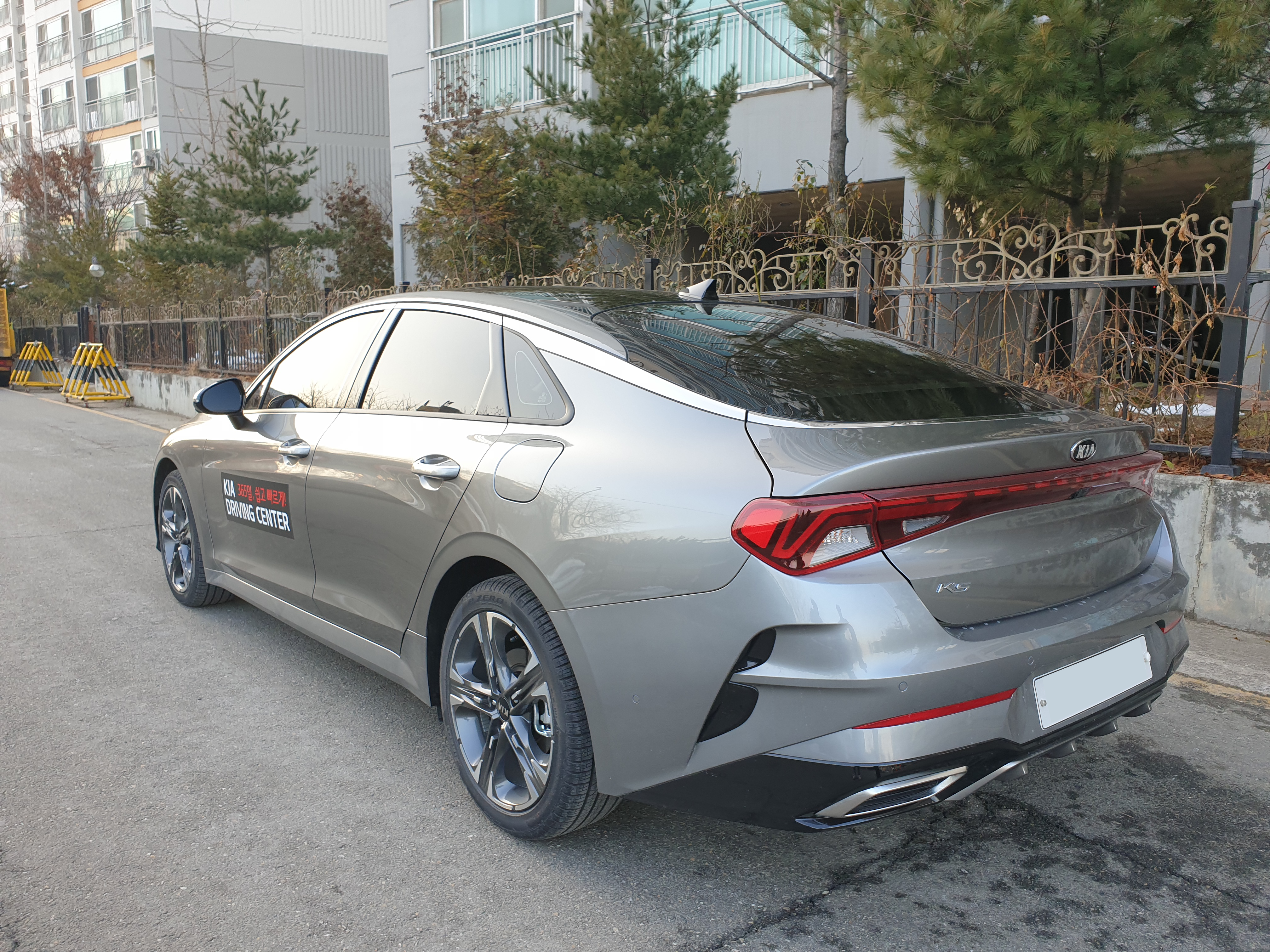 기아 K5 3세대 후측면. 프로젝트명 DL3.